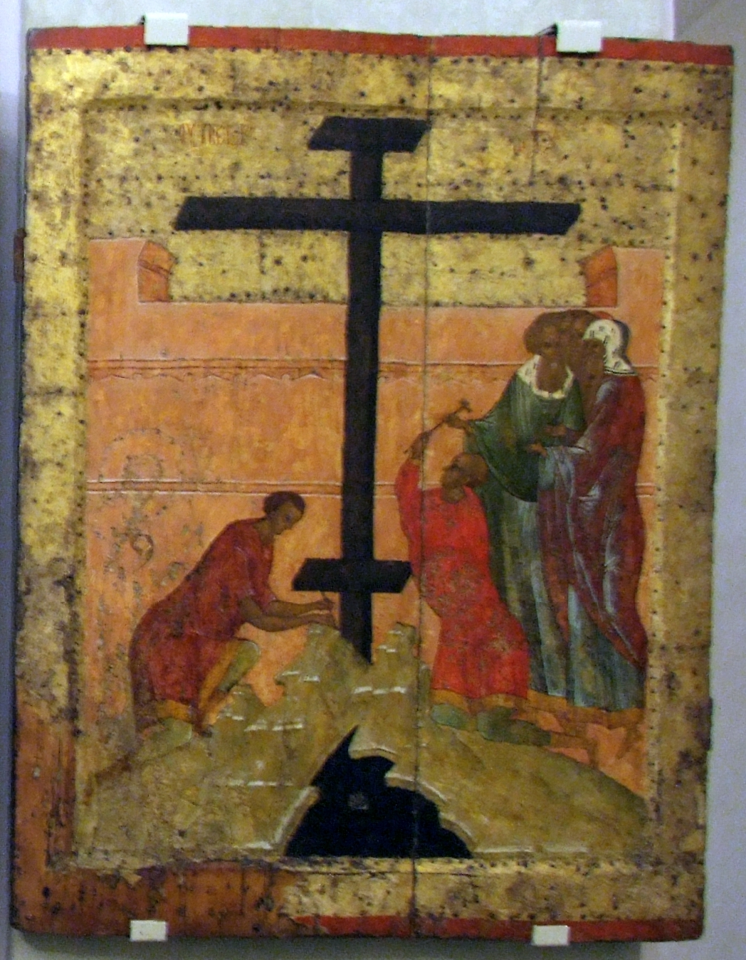 Утверждение креста. Около 1497 (?), ростовская школа (?) Из Успенского собора Кирилло-Белозерского монастыря